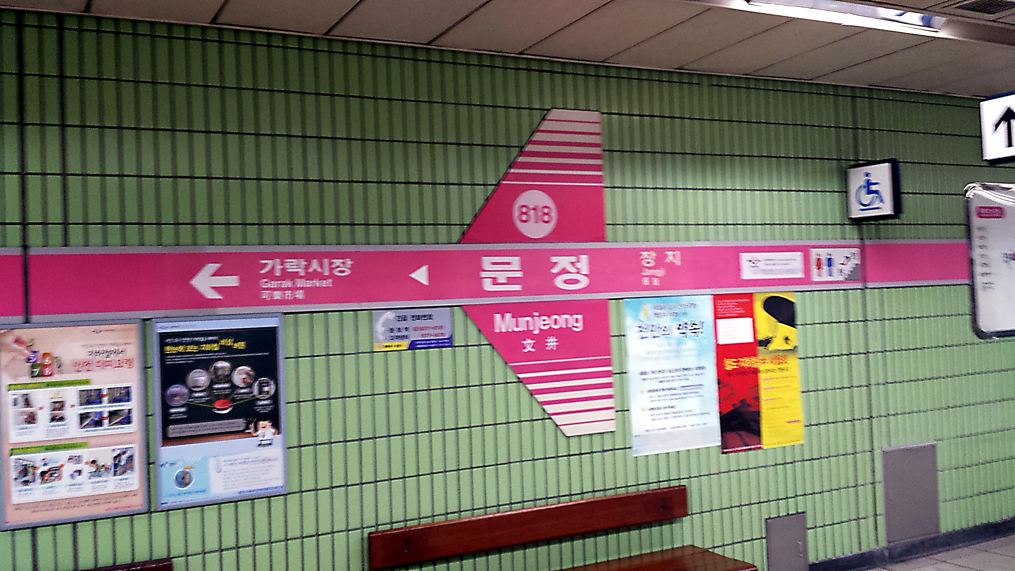 문정역 역명판